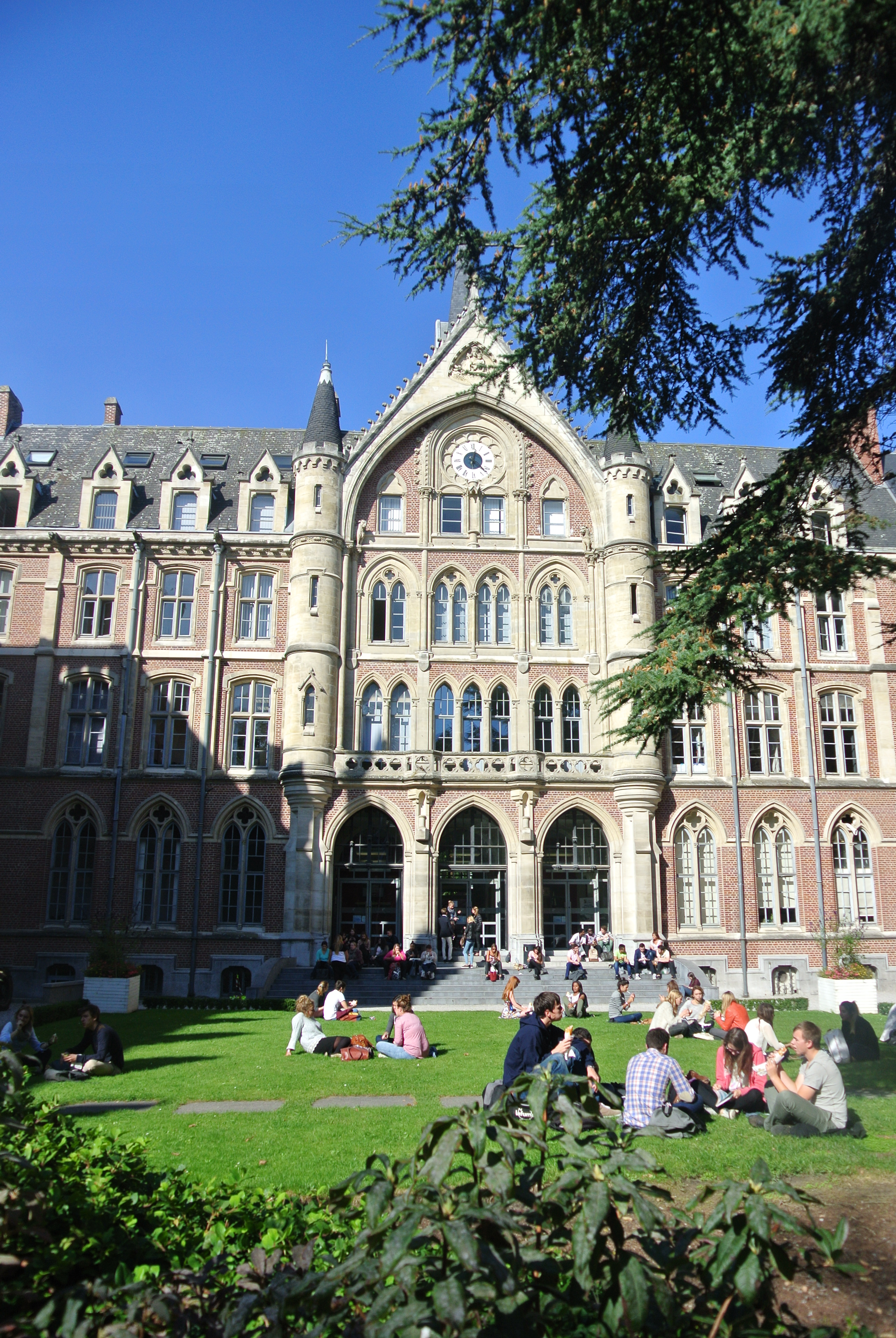 Hôtel Académique 60 boulevard Vauban. Bâtiment principal.